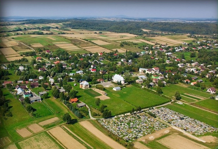 Nienaszów panorama